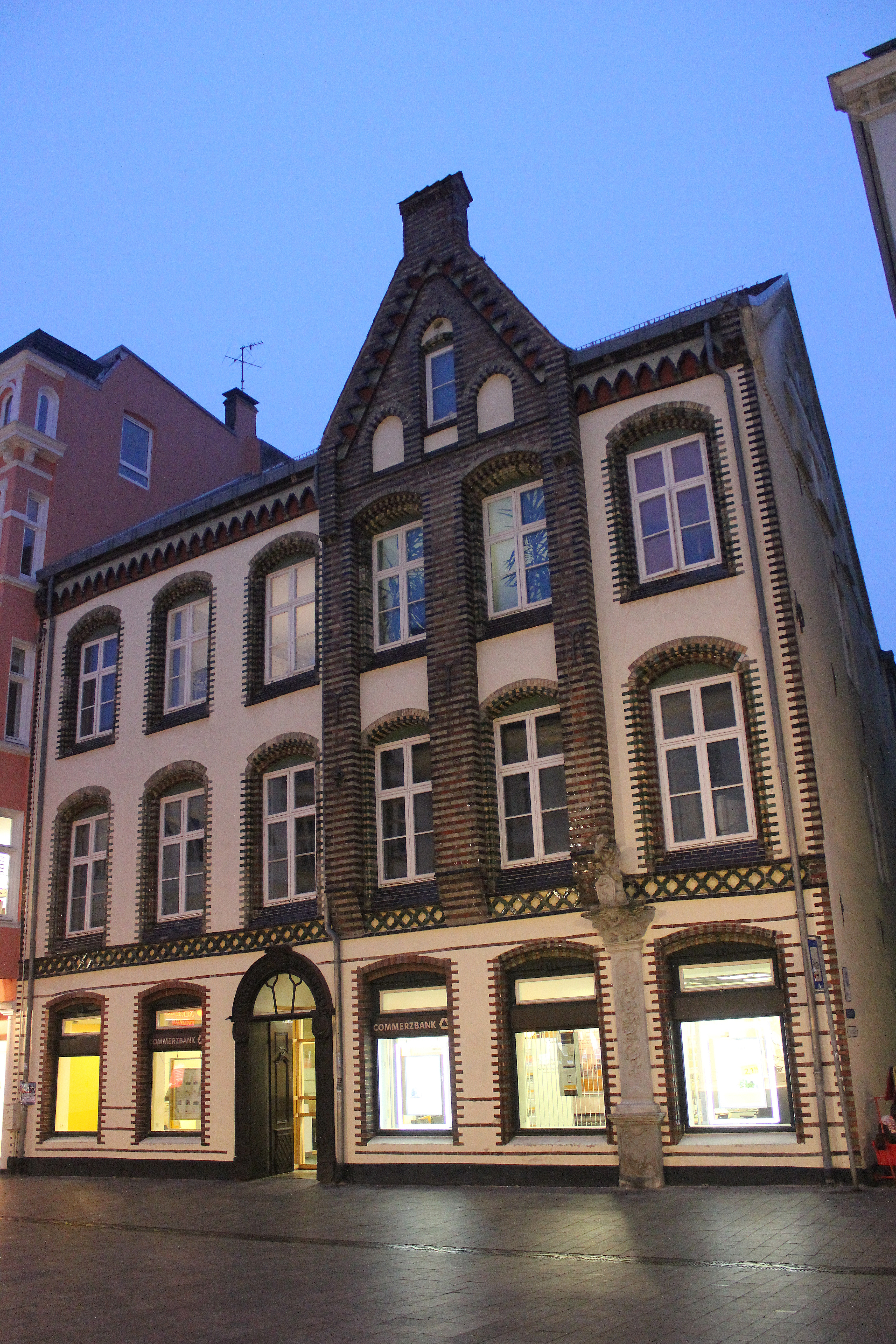 Flensburg Grosse Strasse 16, ehemalige Löwen-Apotheke, Bild 03